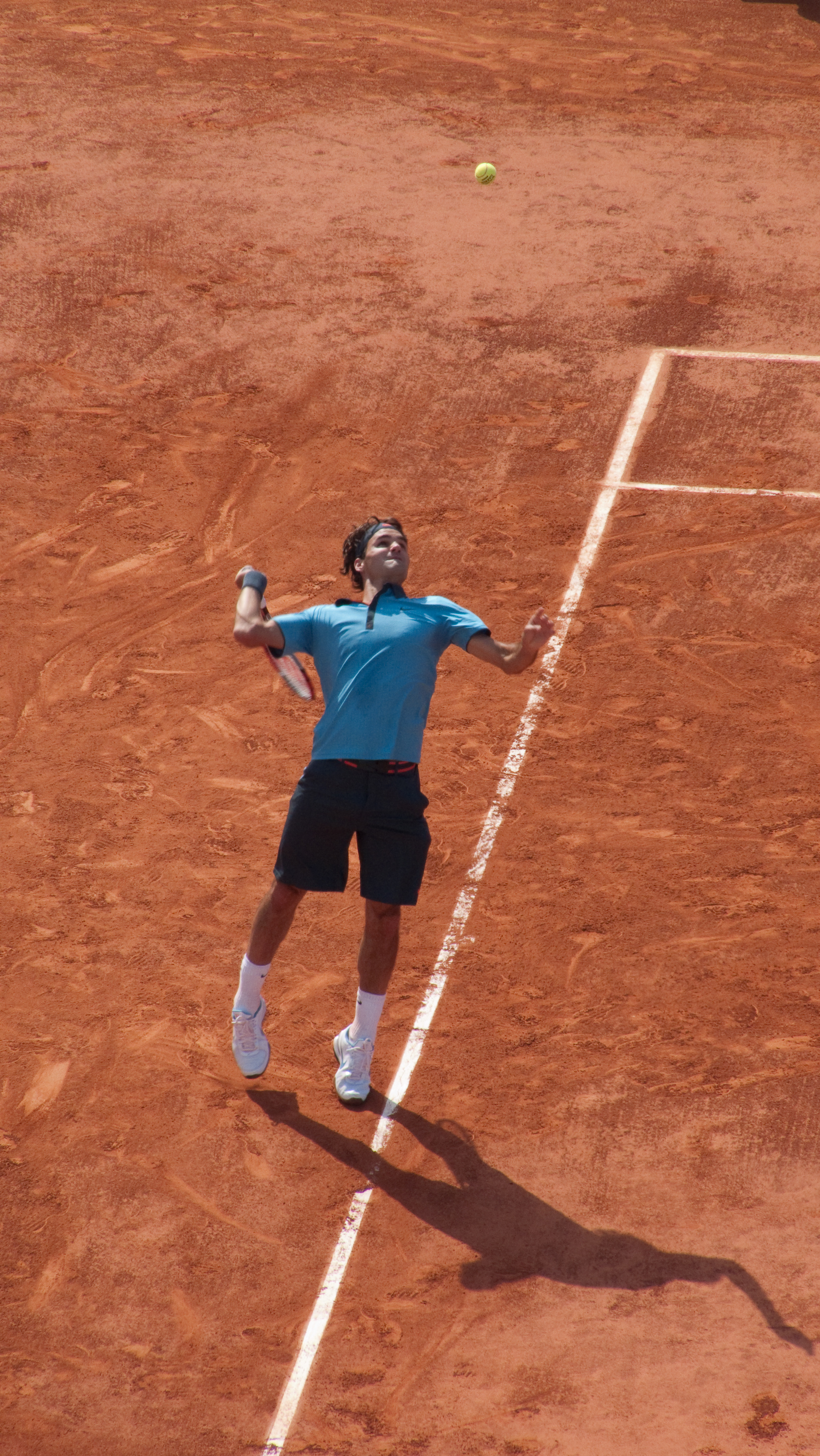 Roger Federer against Juan Martín del Potro in the 2009 French Open semifinals